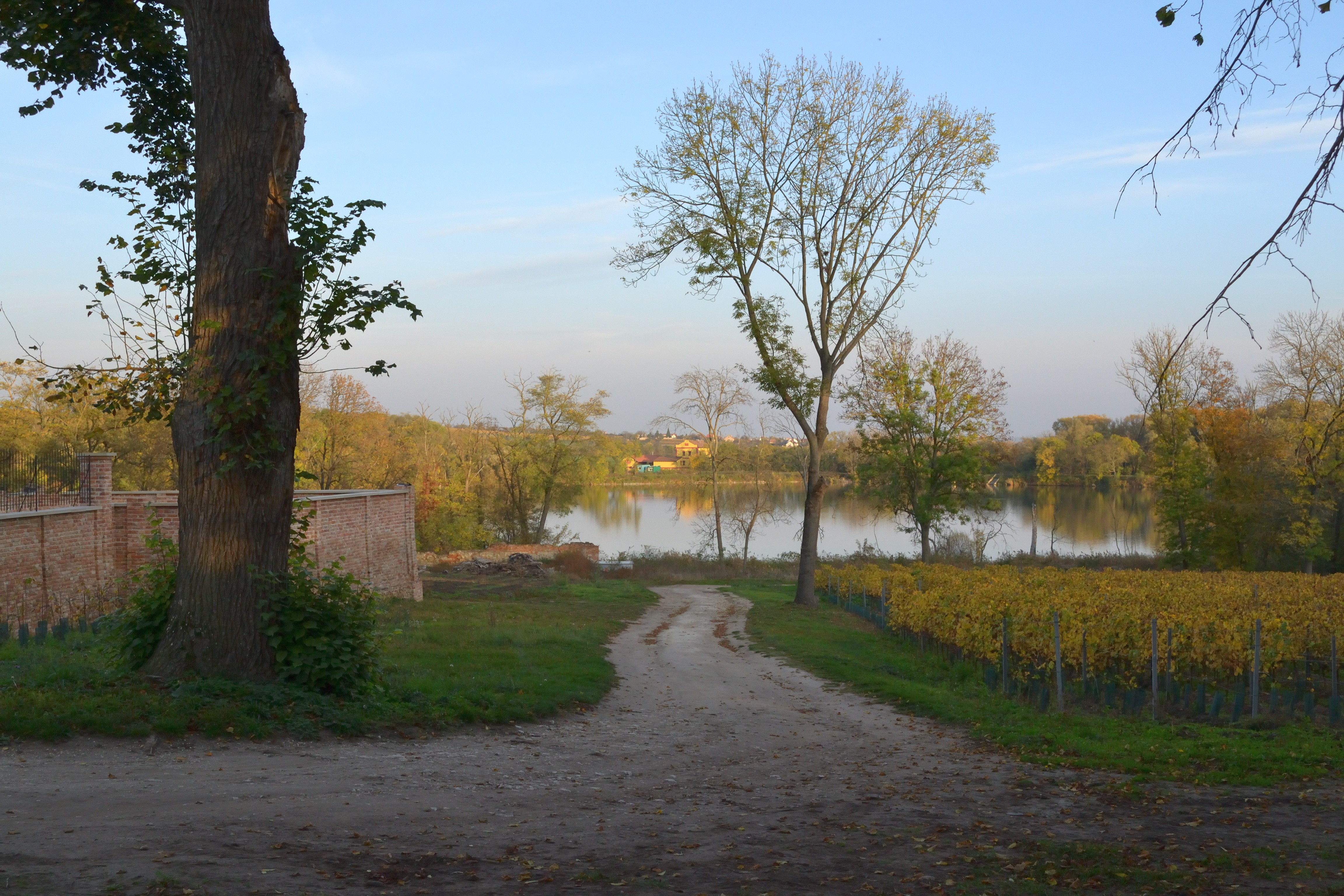 Mikulov - letohrádek Portz, pohled na východ k Novému rybníku